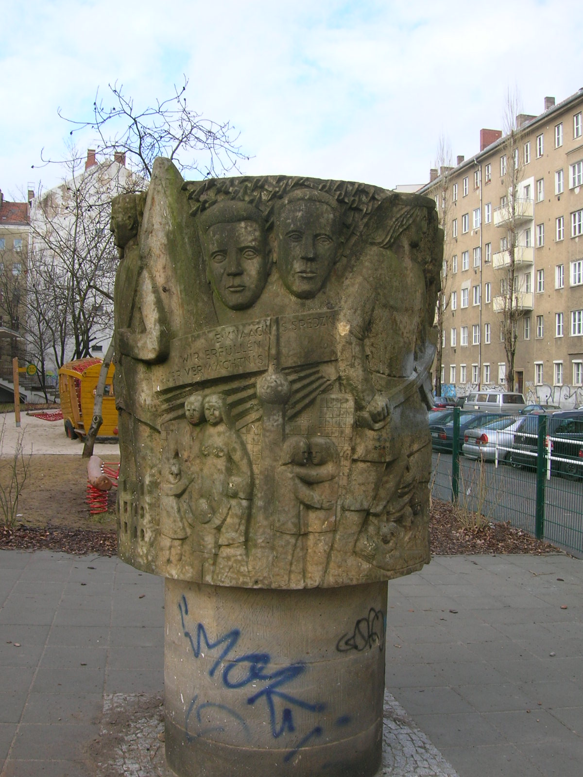 Berlin: Gedenkstele für die Antifaschisten Ernst Knaack und Siegmund Sredzki photo taken by Mazbln on March 26, 2006